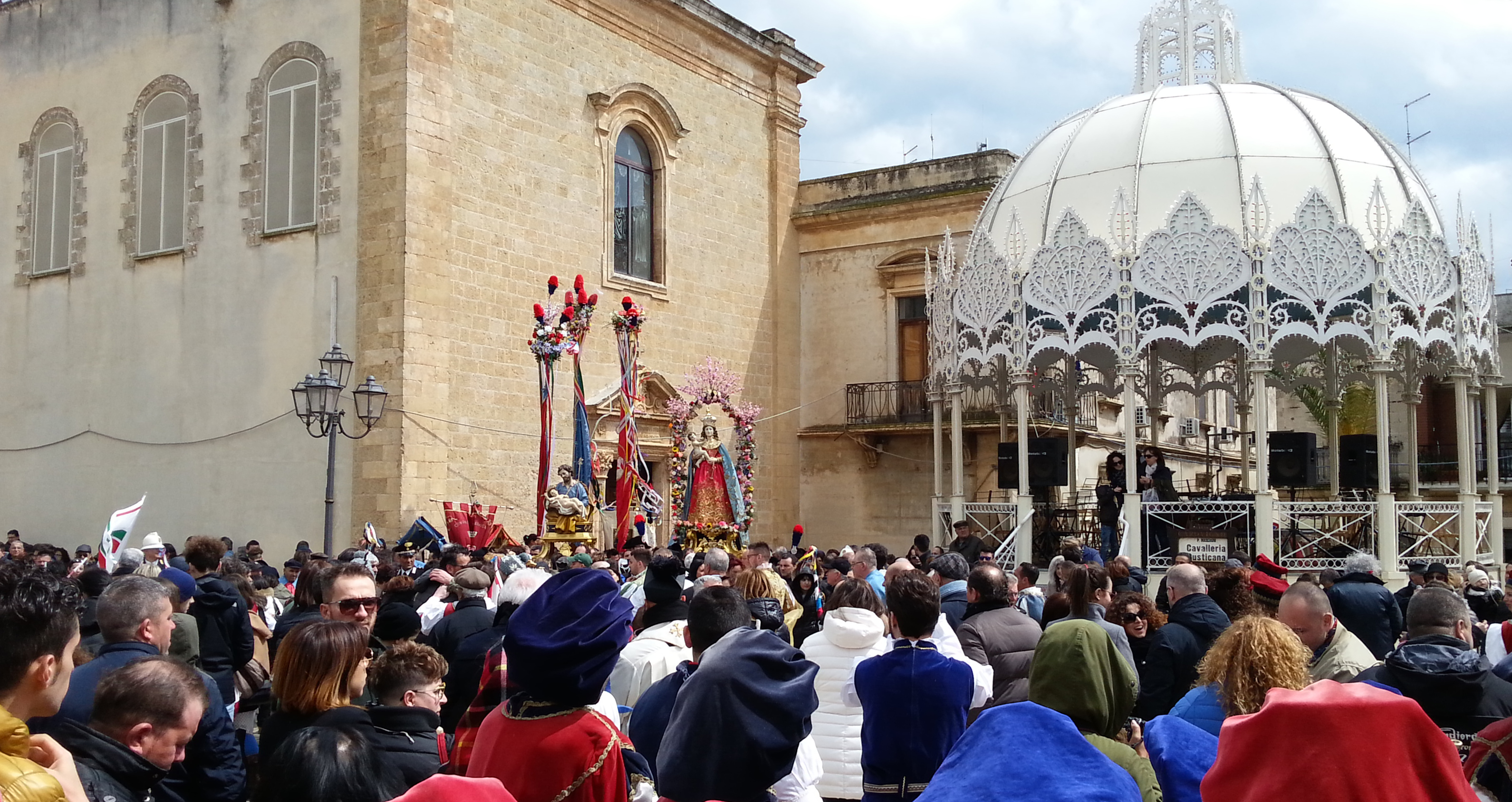 Piazza Nzegna Carovigno, dopo la battuta della Nzegna